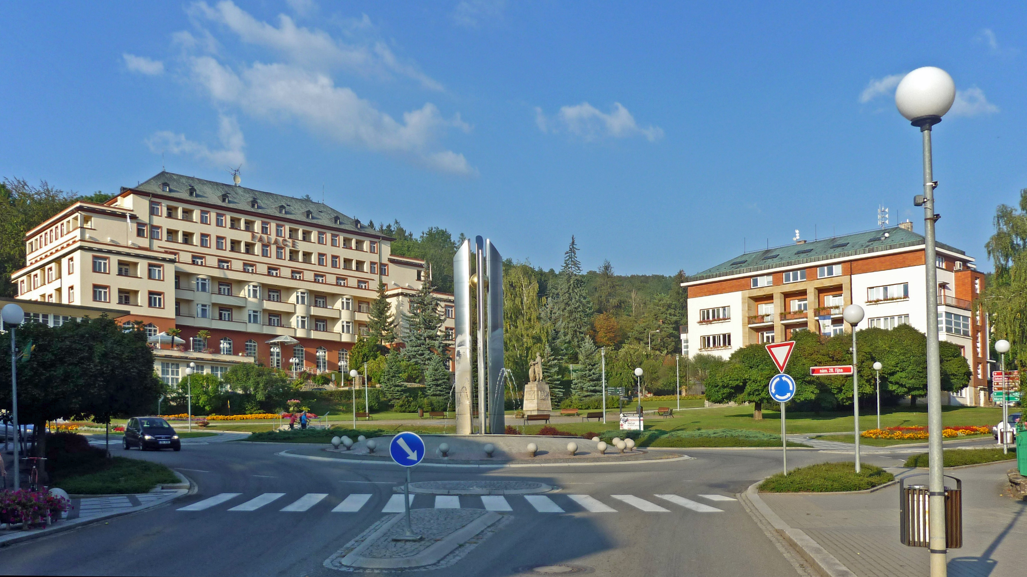 Bad Luhatschowitz (Luhačovice) in Mähren